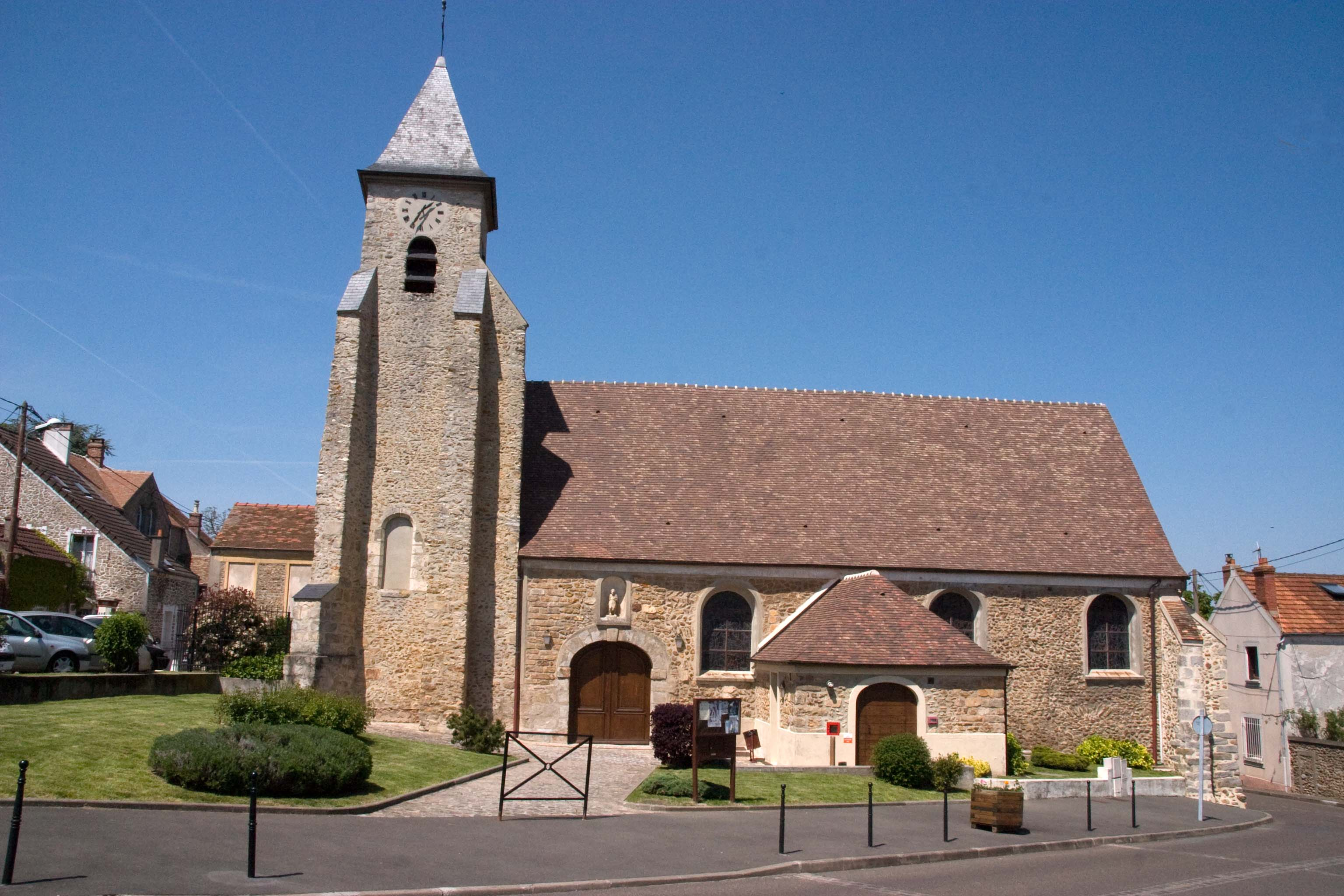 Villabé, Essonne, France Eglise de Villabé